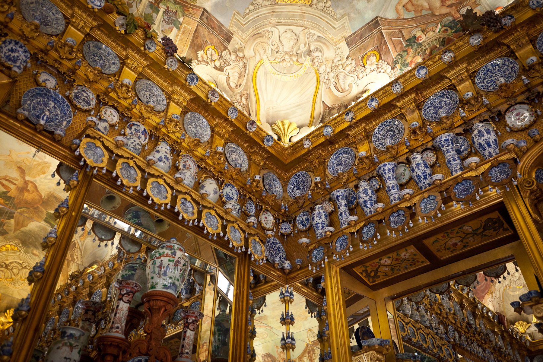 Berlin